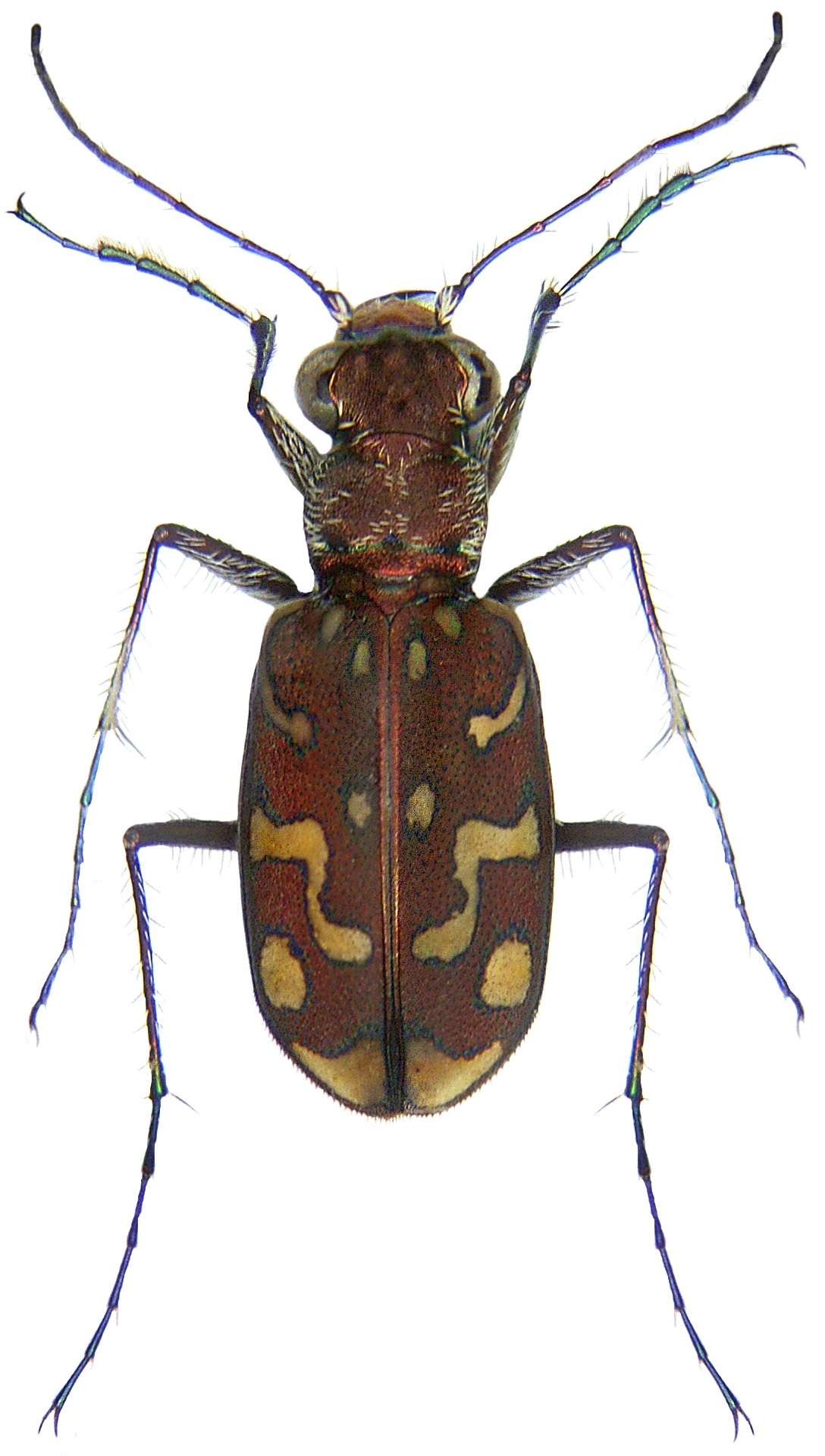 Familie: Carabidae Grösse: 11-14 mm Verbreitung: Mittelmeergebiet Fundort: Tunesien, Djerba leg.det. U.Schmidt, 2007 Foto: U.Schmidt, 2007